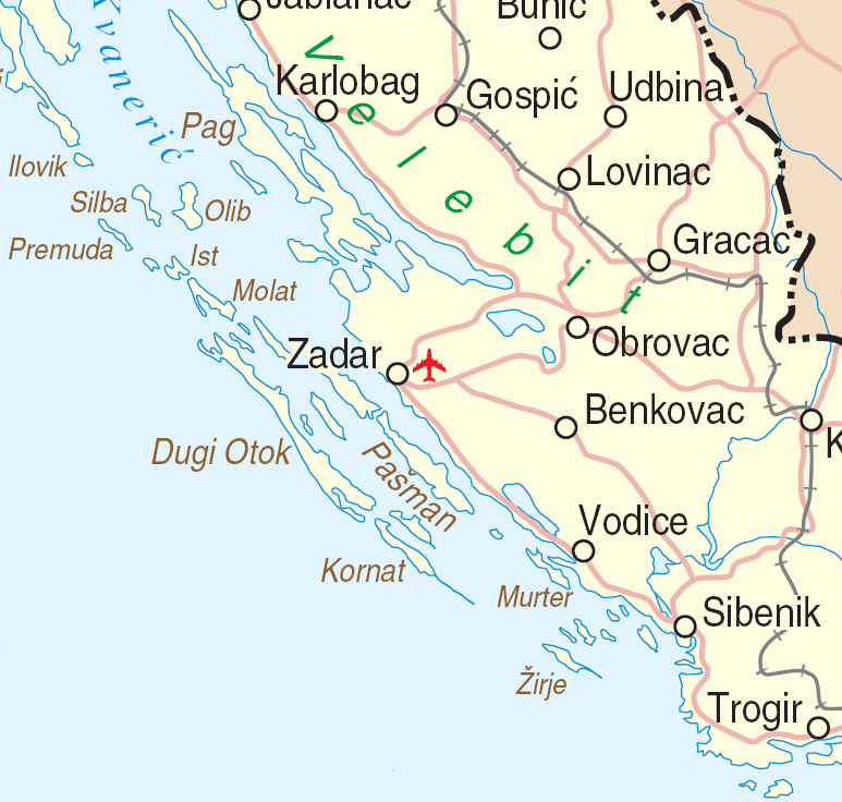 Map of the Central Croatian Adriatic Sea